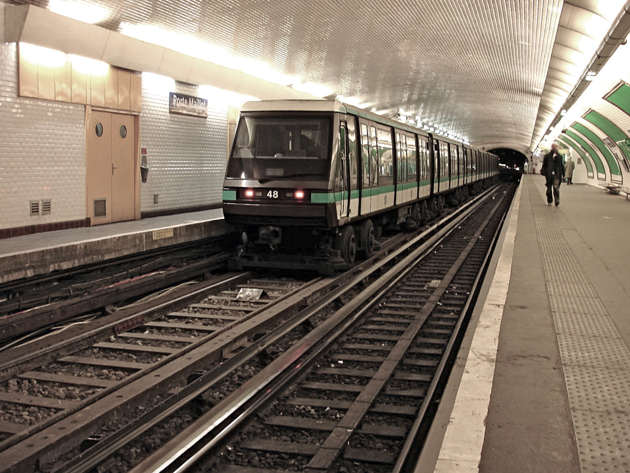 Station Porte Maillot de la ligne 1 du métro de Paris, France.